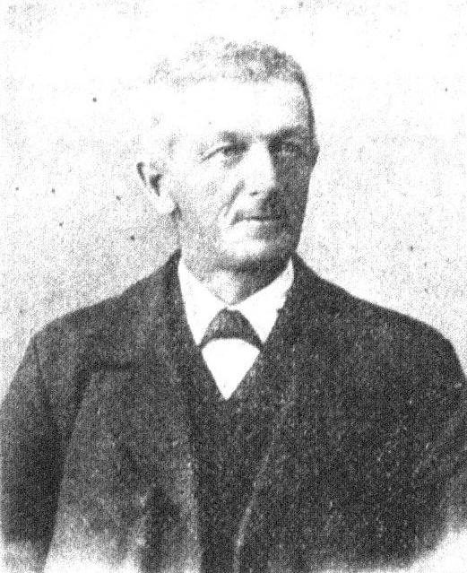 Österreichischer Politiker, Reichsratswahl 1907, Name siehe Dateiname